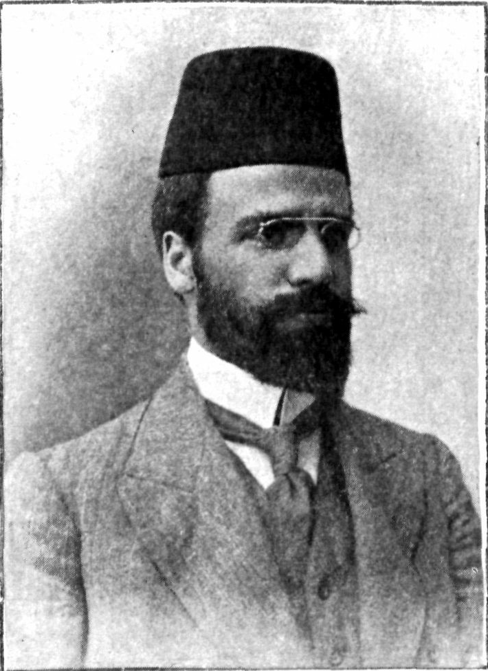 Dimitar Vlahof Efendi (1878-1953) Osmanlı Meclis-i Mebusan'ı Mebusu ve Makedonya Bulgarları'ndan sosyalist devrimci.